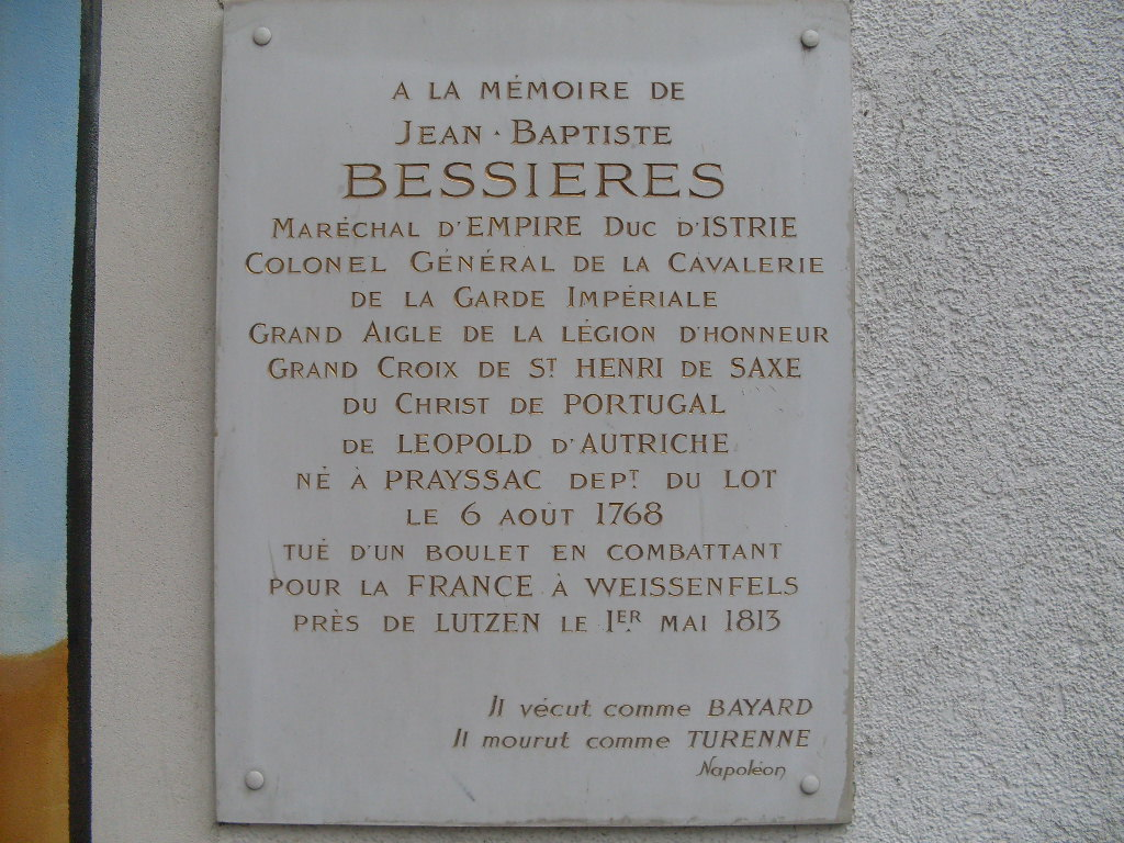 Erinnerungstafel Marschall Bessières in Rippach (Zustand im Juli 2011)